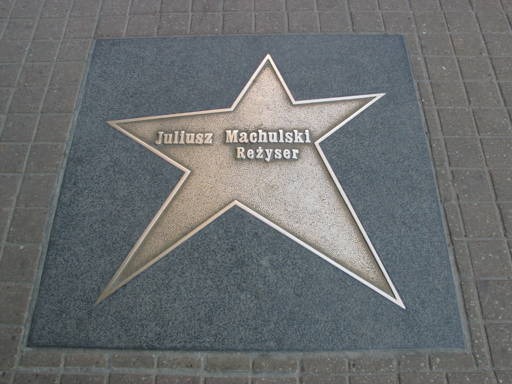 Łódź Walk of Fame - Juliusz Machulski